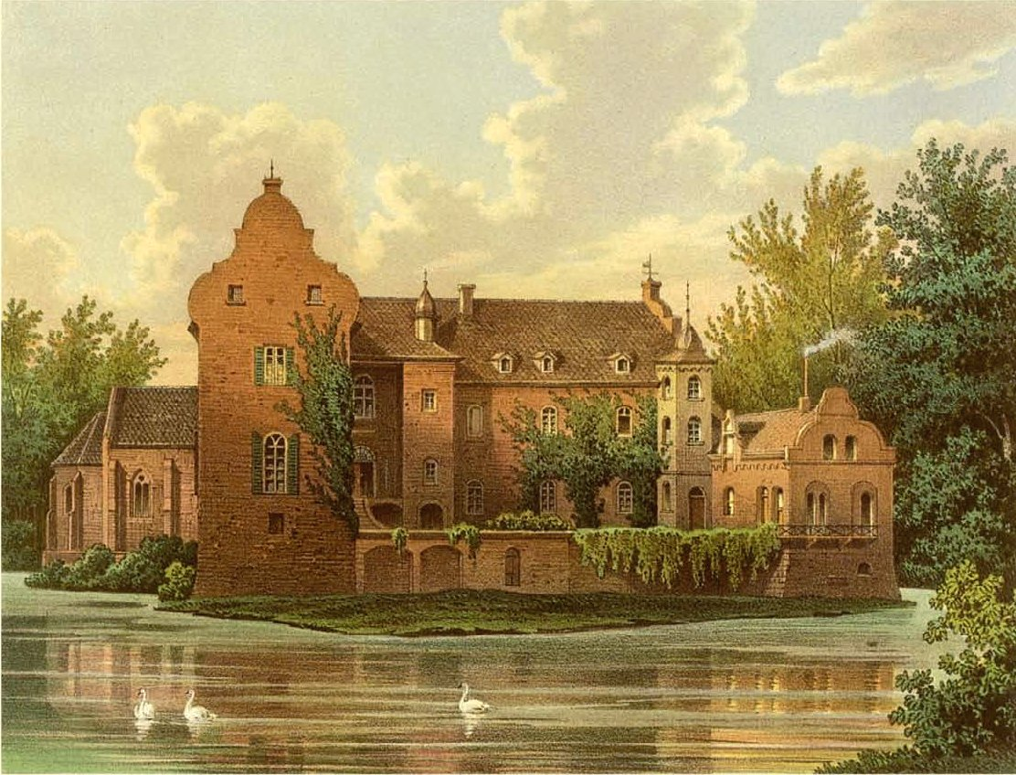 Burg Bergerhausen, Kreis Bergheim, Rheinprovinz